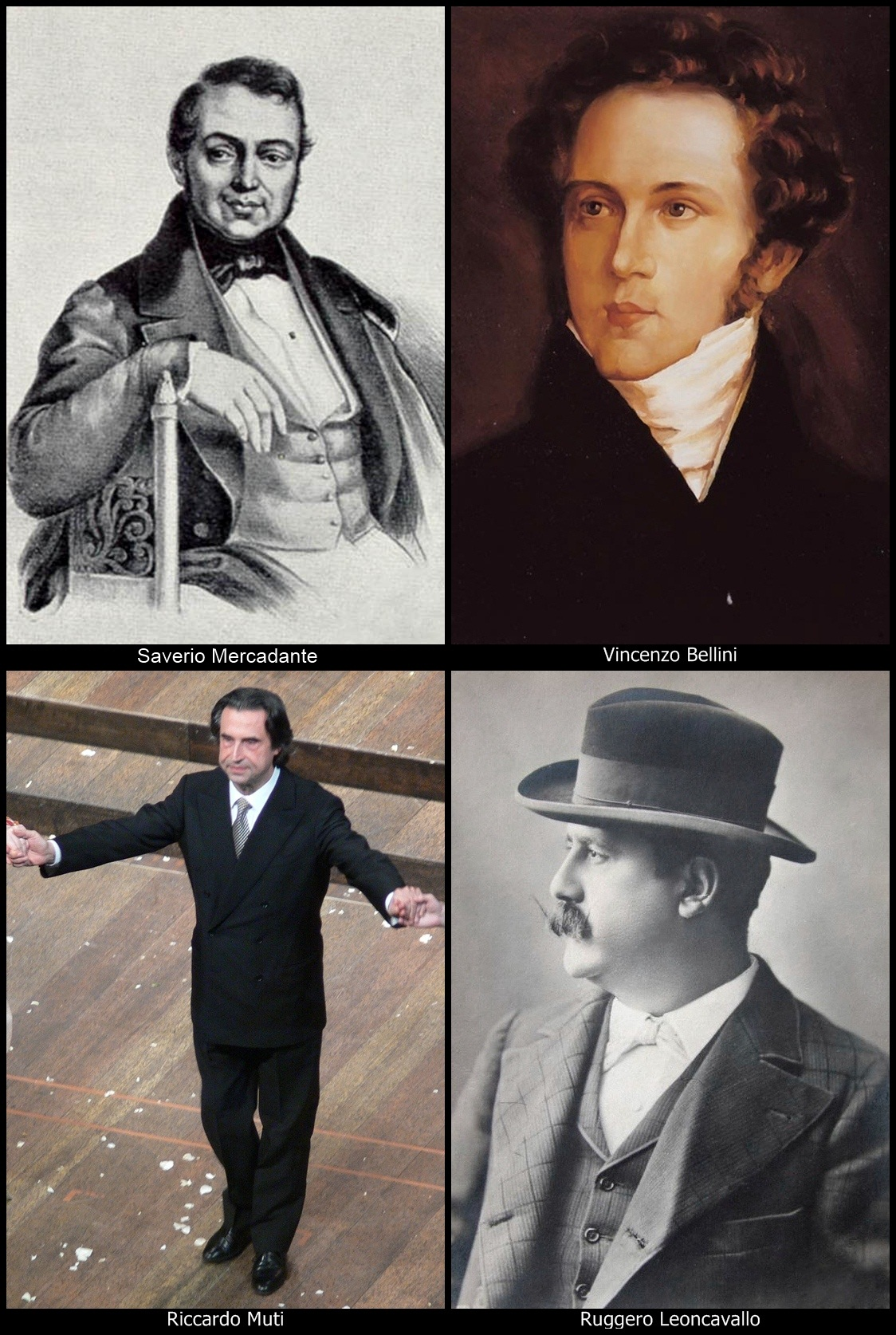 Collage composto da immagini di diplomati al Conservatorio di San Pietro a Majella di Napoli. In senso orario a partire dalla foto in alto a sinistra: Saverio Mercadante, Vincenzo Bellini, Ruggero Leoncavallo, Riccardo Muti.